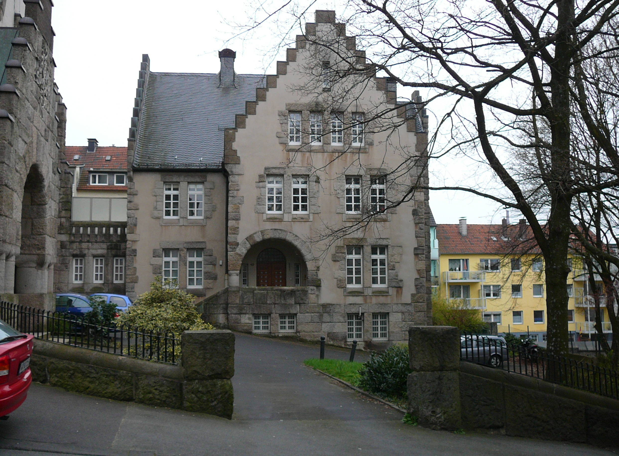 Obere Sehlhofstraße, Wuppertal